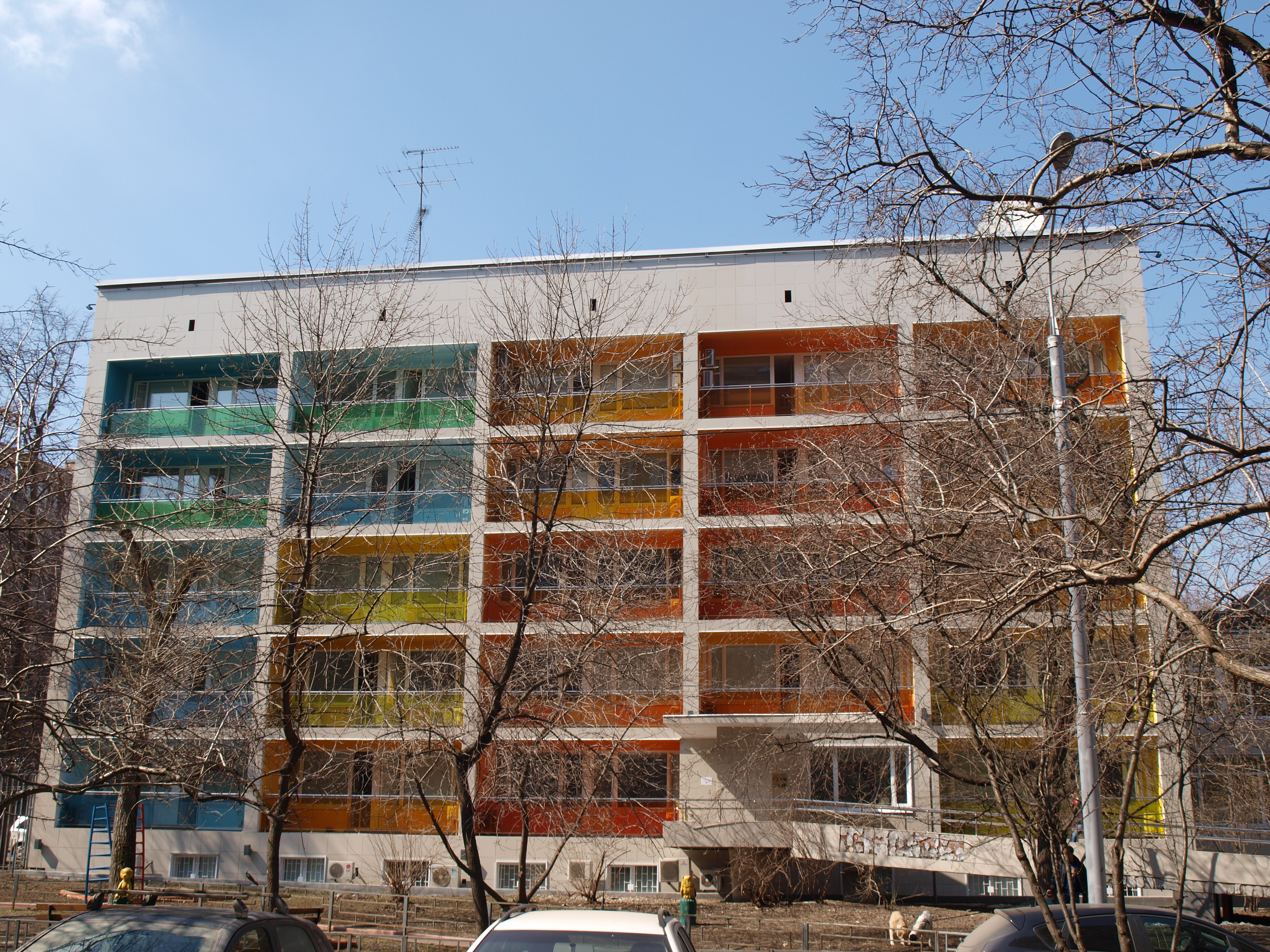 дом 15а ул. Правды, Москва